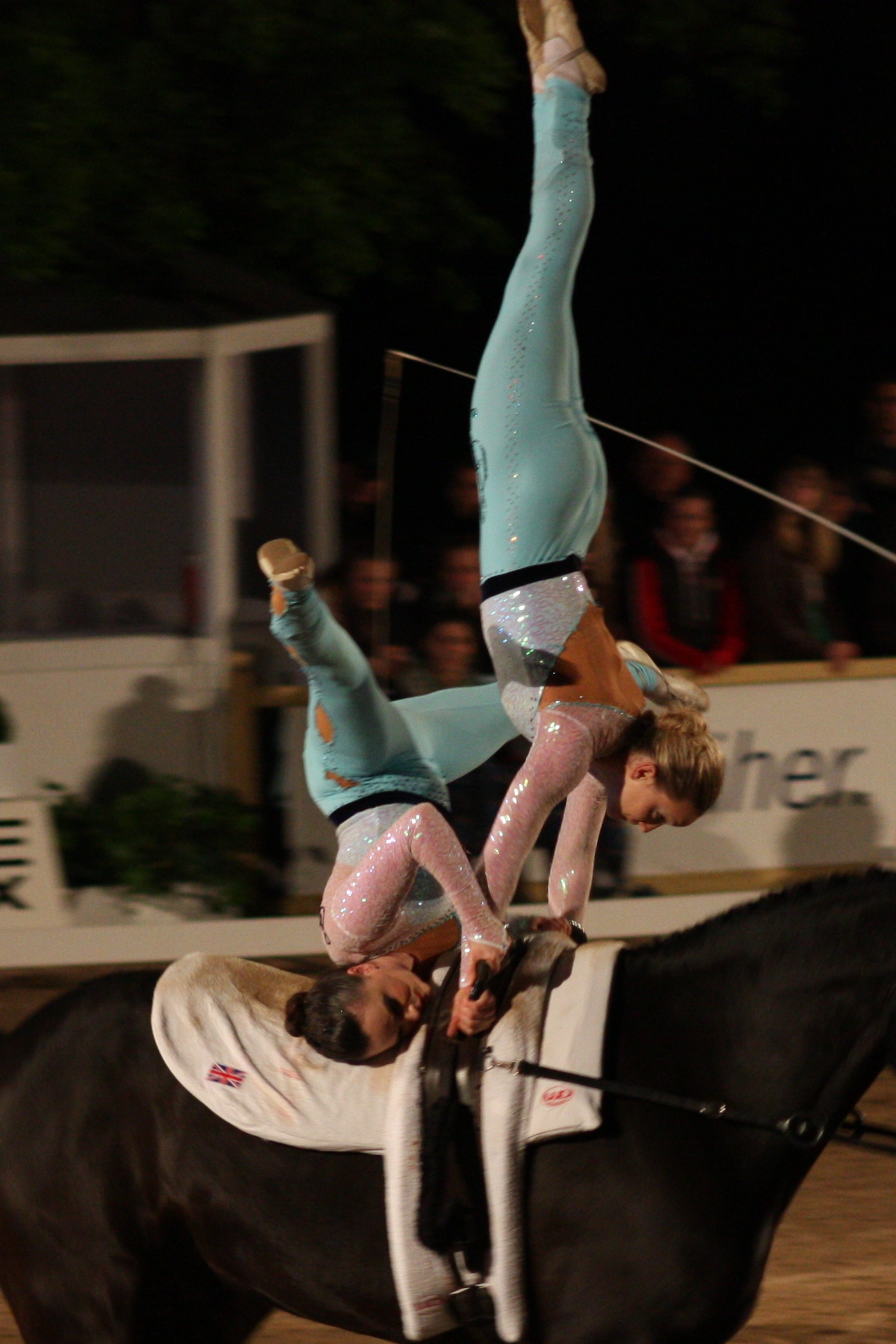 77. Internationales Pfingstturnier Wiesbaden 2013, CVI *** Voltigieren, Joanne und Hannah Eccles mit WH Bentley Personality rights warning Although this work is freely licensed or in the public domain, the person(s) shown may have rights that legally restrict certain re-uses unless those depicted consent to such uses. In these cases, a model release or other evidence of consent could protect you from infringement claims.